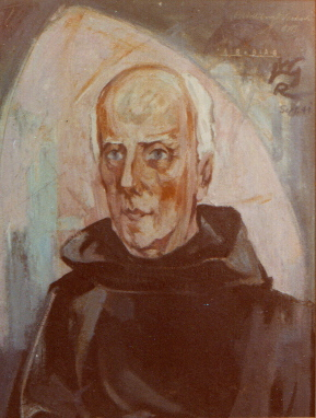 Rudolf Wilhelm Heinisch, Malermönch Jan Verkade, o.J., vor 1947, Öl auf Leinwand